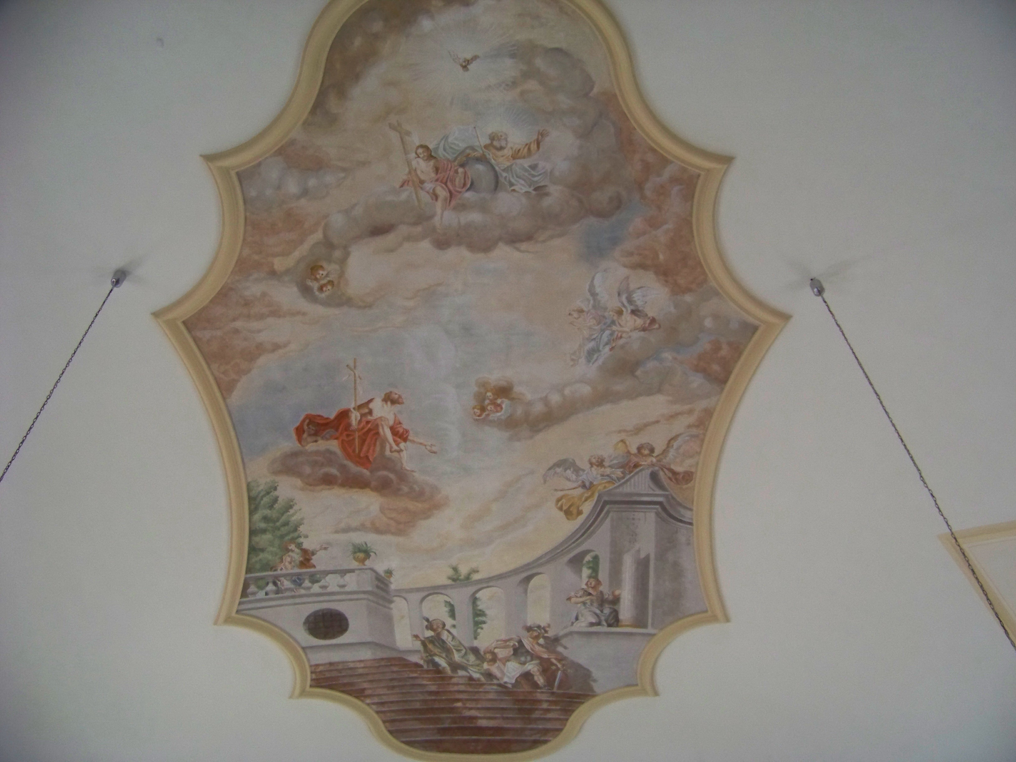 Neufahrn in Niederbayern. Hebramsdorf 5. Filialkirche St. Johannes der Täufer. Erbaut 1730, über älterem Kern; mit Ausstattung. Deckengemälde im Langhaus